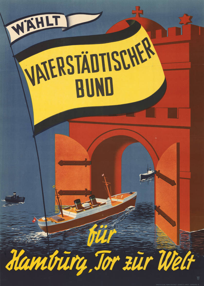 Wählt Vaterstädtischer Bund für Hamburg, Tor zur Welt Abbildung: Dampferschiff fährt durch das große Hafentor des Hamburger Wappens auf das Meer hinaus (Grafik) Plakatart: Motiv-/Textplakat Künstler_Grafiker: Signet: WW =S= Drucker_Druckart_Druckort: Graphische Kunstanstalt Schultz GmbH, Hamburg Objekt-Signatur: 10-006 : 50 Bestand: Plakate zu Bürgerschaftswahlen Hamburg (10-006) GliederungBestand10-18: Plakate zu Bürgerschaftswahlen Hamburg (10-006) » Vaterstädtischer Bund Hamburg (VBH) Lizenz: KAS/ACDP 10-006 : 50 CC-BY-SA 3.0 DE